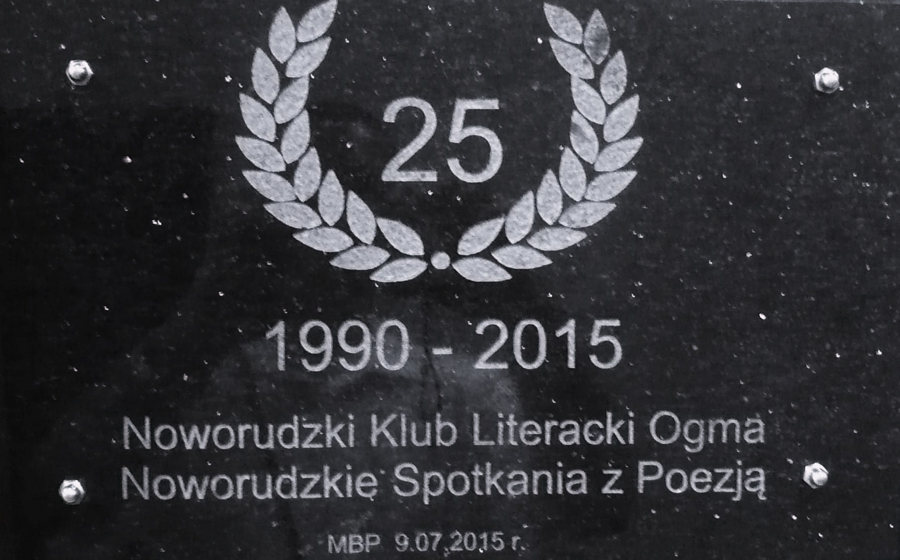 Odsłonięcie tablicy pamiątkowej w MBP w Nowej Rudzie. 25 lat - Noworudzki Klub Literacki Ogma, Noworudzkie Spotkania z Poezją. 9.07.2015 r.